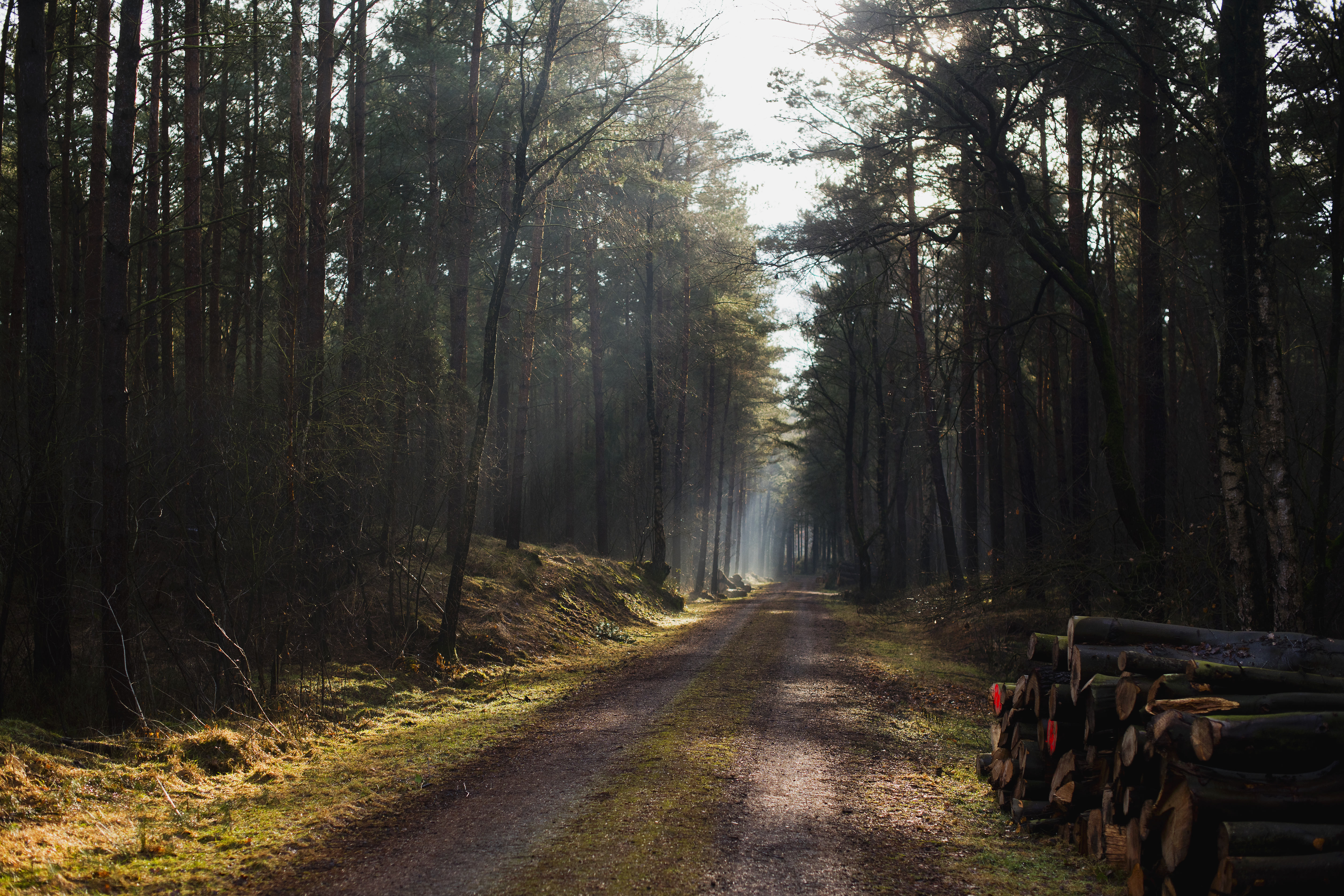 Ein Waldweg im Naturschutzgebiet Barneführer Holz und Schreensmoor im Landkreis Oldenburg